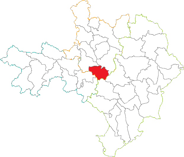 Situation du canton dans le département du Gard (France)